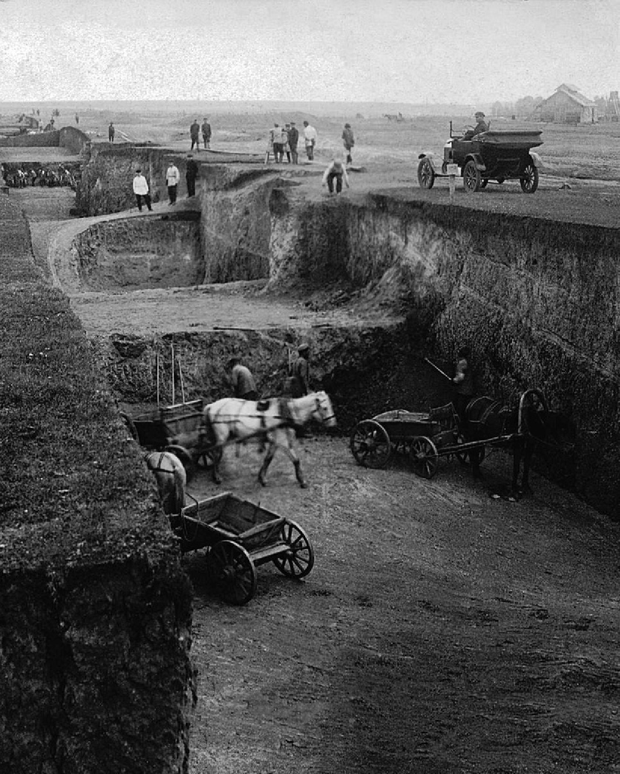 Челябинская электростанция. Рытьё котлована под фундамент ЧГРЭС. Все работы производились вручную. Лопаты, носилки, канаты, тачки – единственные «механизмы», которые использовались на строительстве. Государственный исторический музей Южного Урала